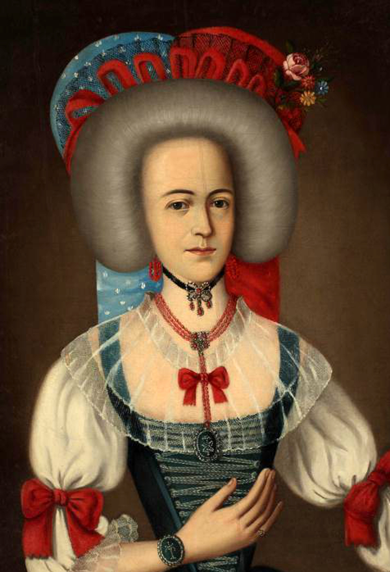 Vargyasi báró Daniel Polixénia (avagy Polyxena, Szászvessződ, 1720. január 14. – Zsibó, 1775. szeptember 24.) írónő.